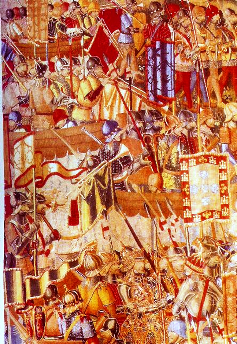 Tapeçarias de Pastrana, Museu da Colegiada, Pastrana, Espanha: detalhe do desembarque na série da conquista de Arzila (1471) pelas forças de Afonso V de Portugal.